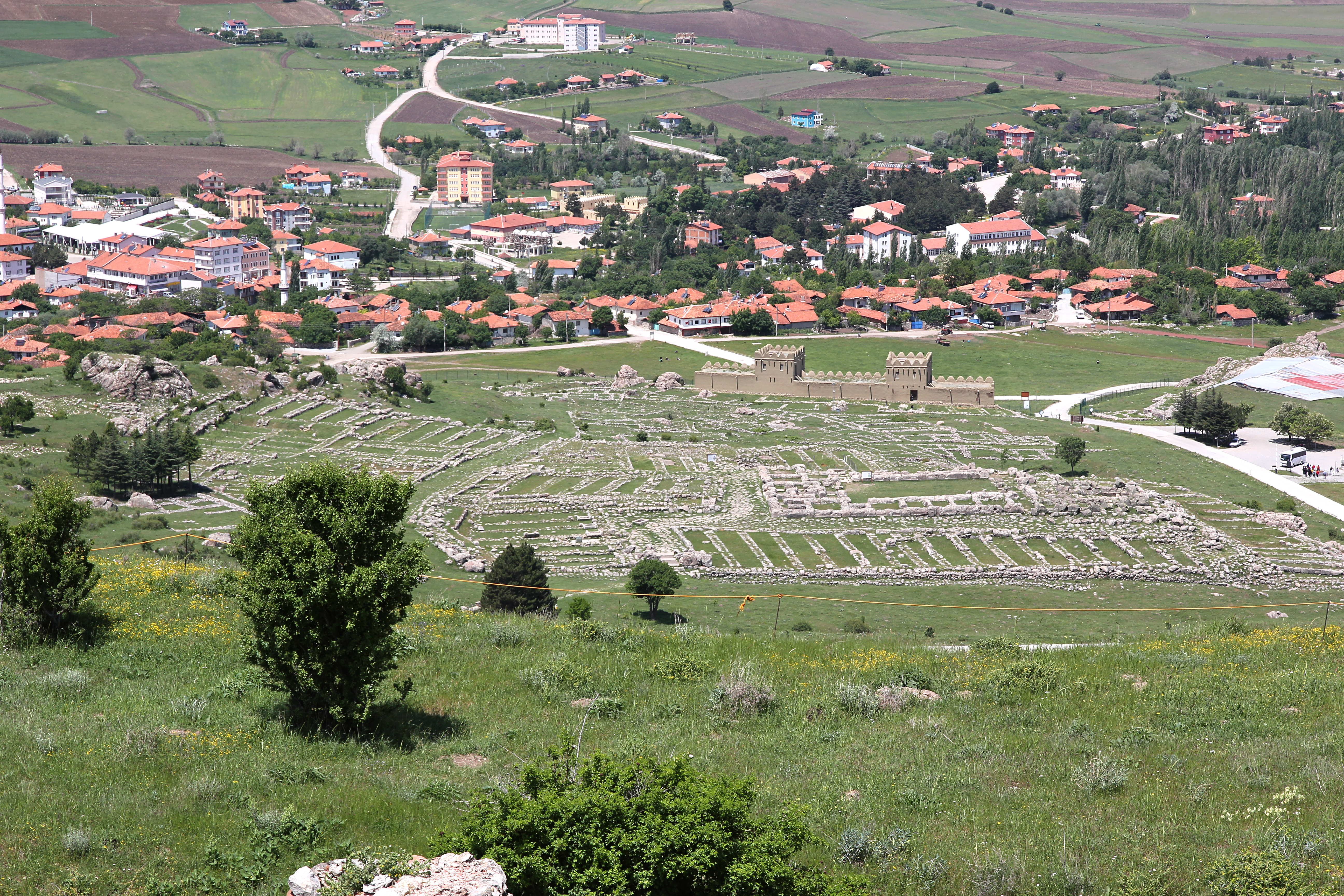 Ḫattuša, hethitische Hauptstadt bei Boğazkale, Zentraltürkei, Großer Tempel von Büyükkale aus